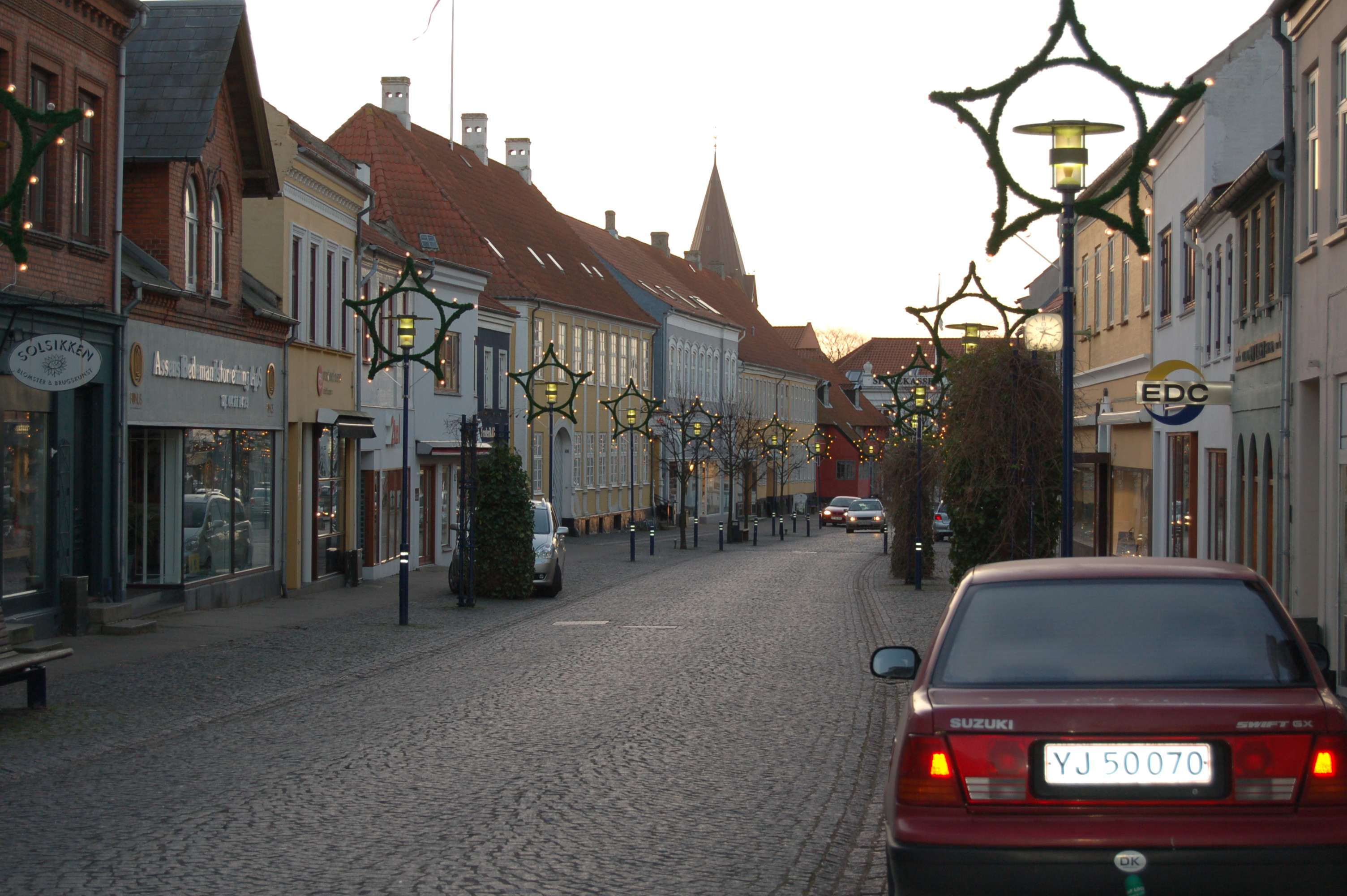 Street in Assens, Denmark